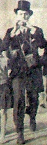 Suomalainen okkultisti ja uusnatsi Timo Pekka Siitoin (1944-2003) vuonna 1963 Turussa.